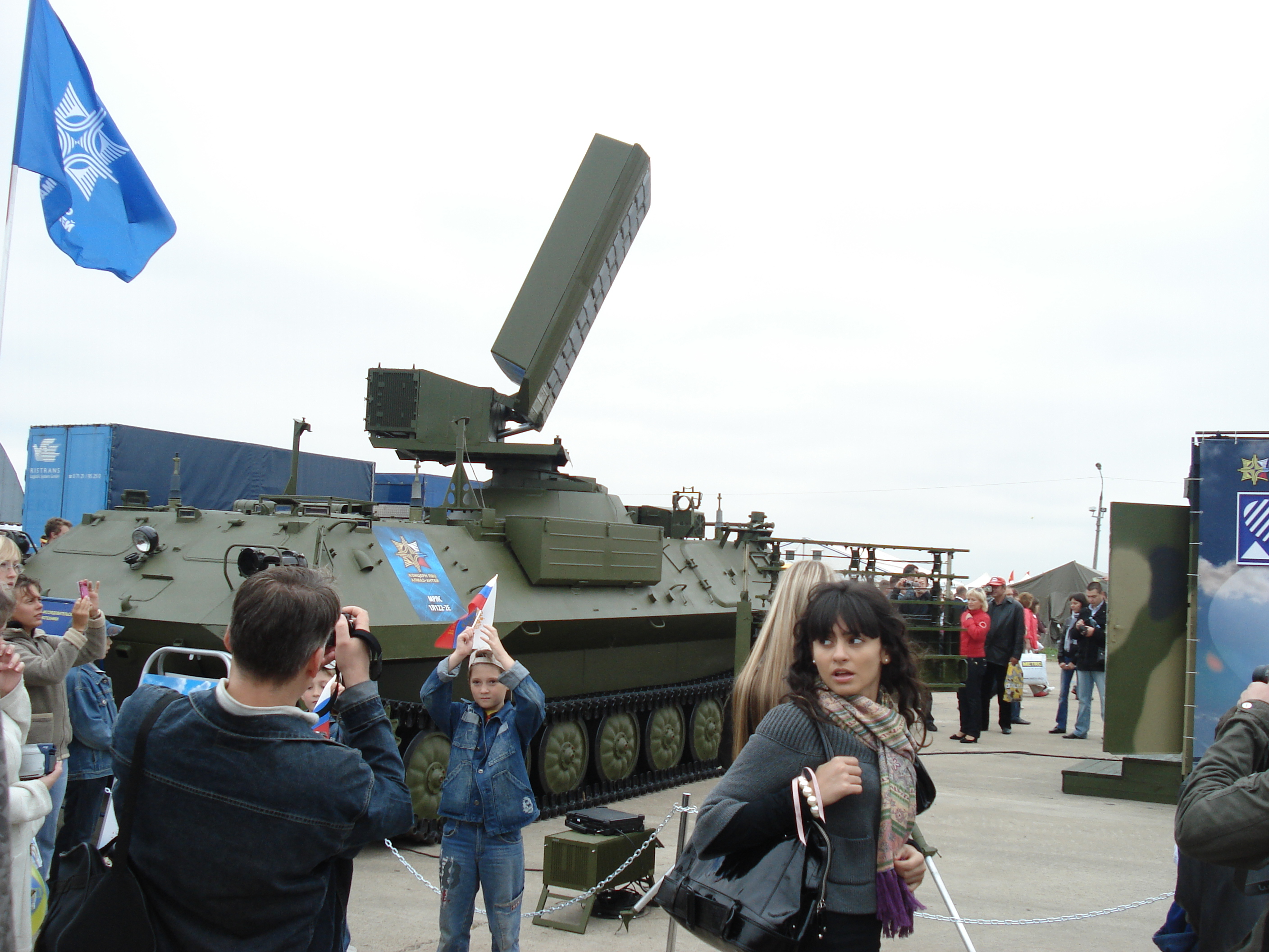 Almaz-Antey's radar 1L122-2E at MAKS 2009